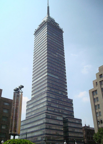 Torre Latinoamericana